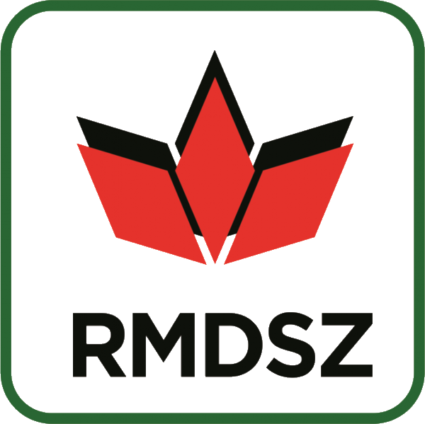 A Romániai Magyar Demokrata Szövetség logója.